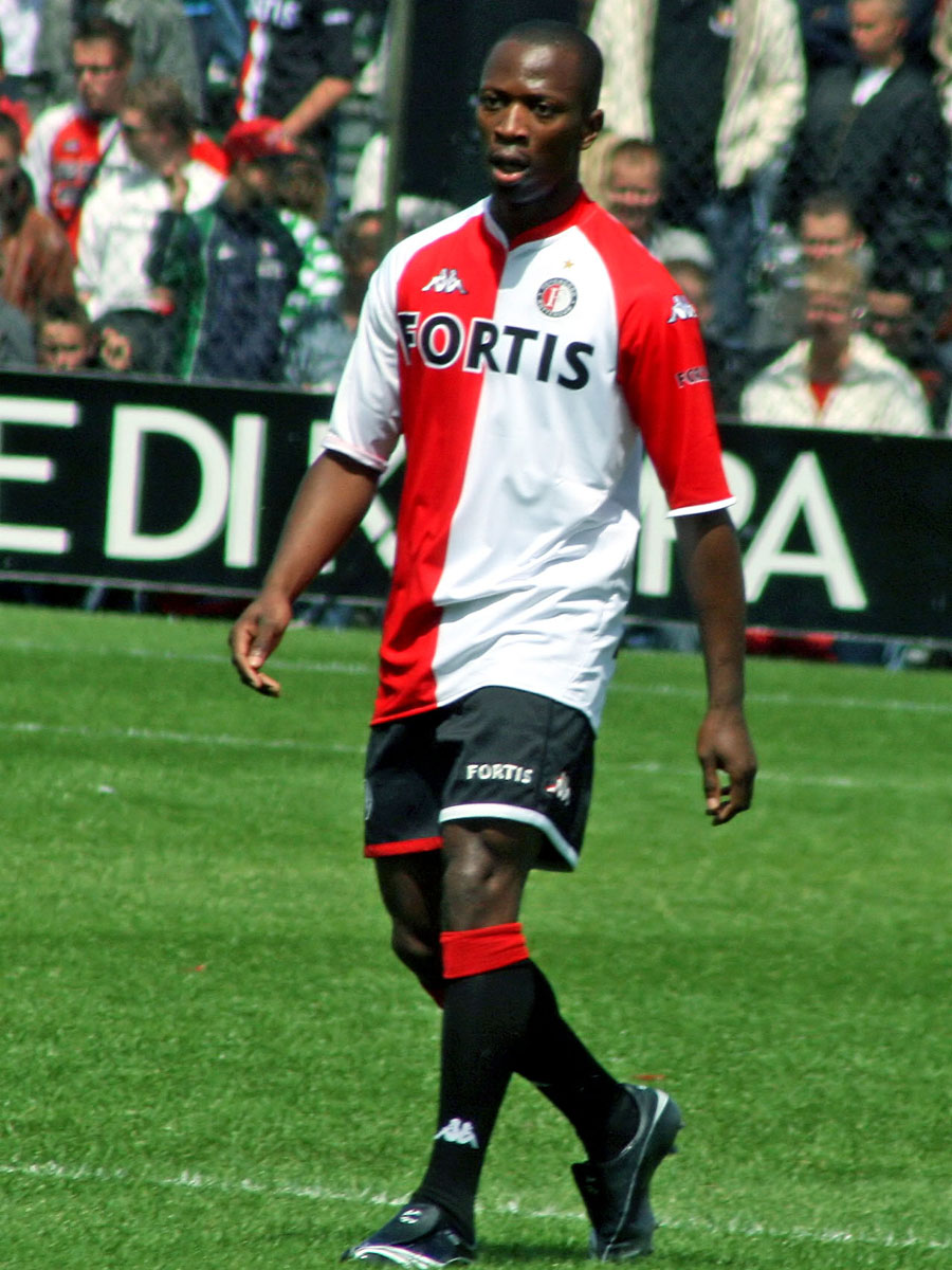 Romeo Castelen (Feyenoord)